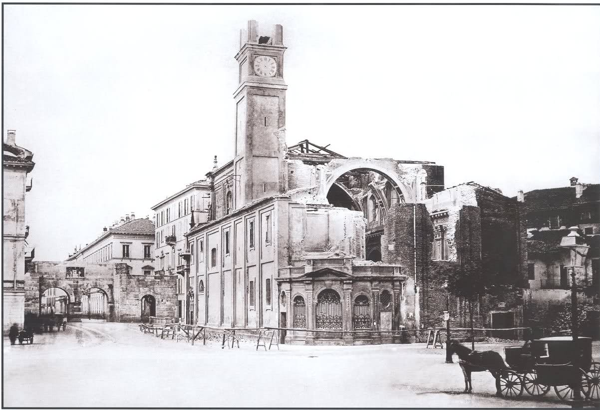 Demolizione della chiesa di San Bartolomeo a Milano, posta nell'attuale piazza Cavour